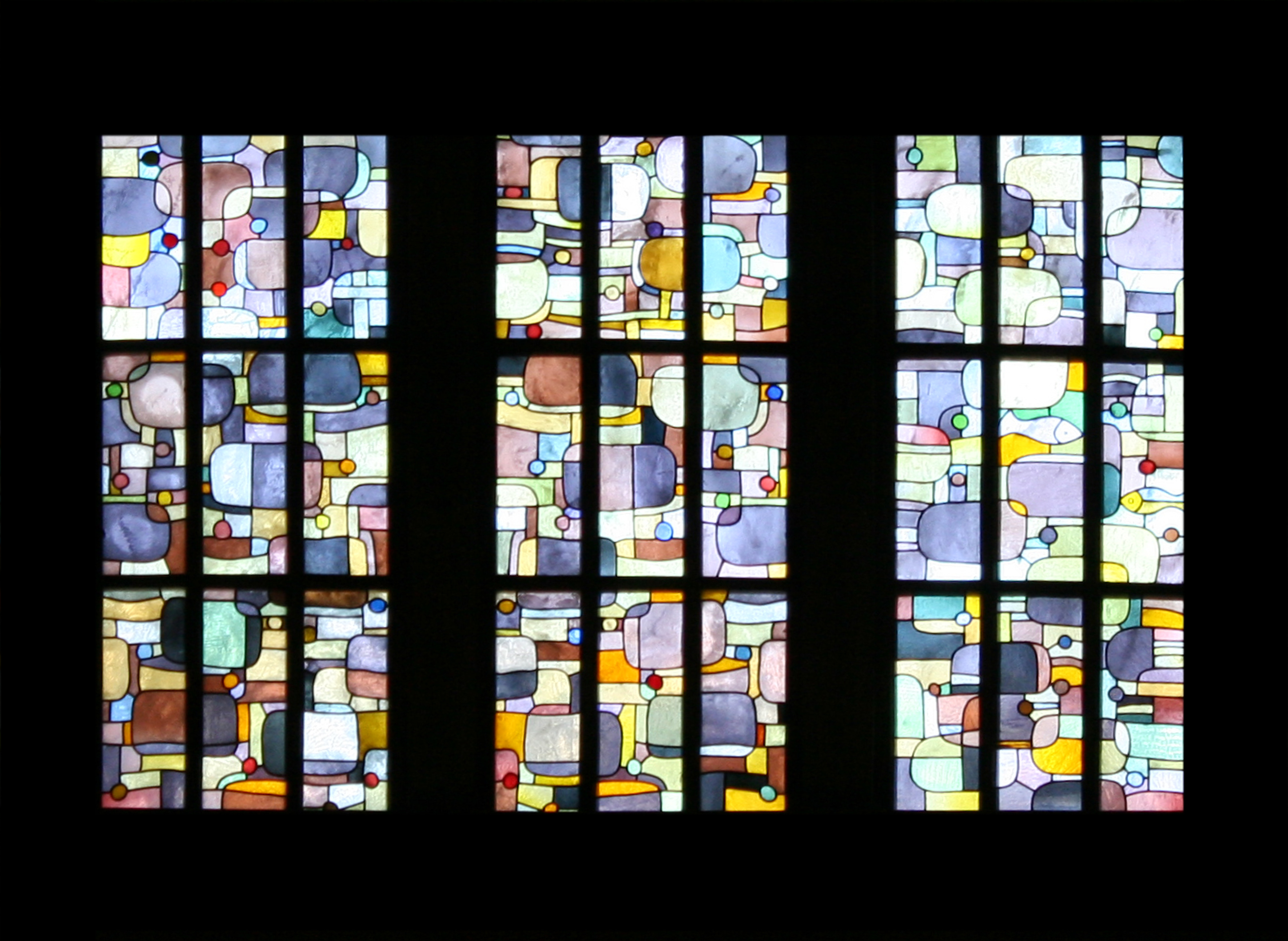 Römisch-katholische Pfarrkirche St. Karl Luzern, Glasfenster im Chor in der Gestaltung von Hans Stocker